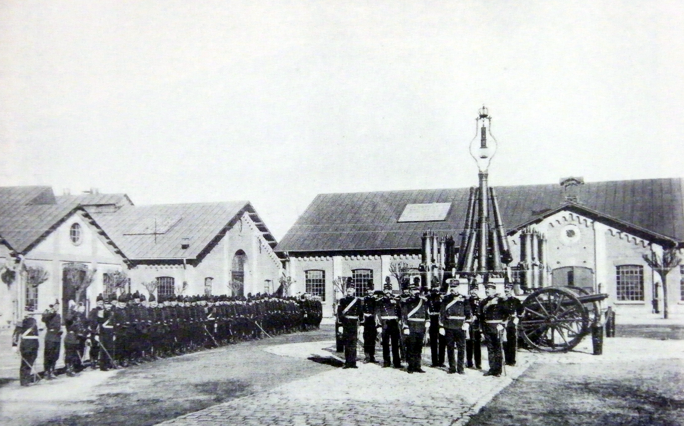 Arsenalul de construcţii al Armatei României la 1902 - Sursa - fotocopie proprie din Albumul omagial "Armata României - Marelui ei Căpitan" publicat la editura IV Socec în anul 1902 - Restricţii - Fără restricţii datorită vechimii. Imaginea este în domeniul public de la publicare